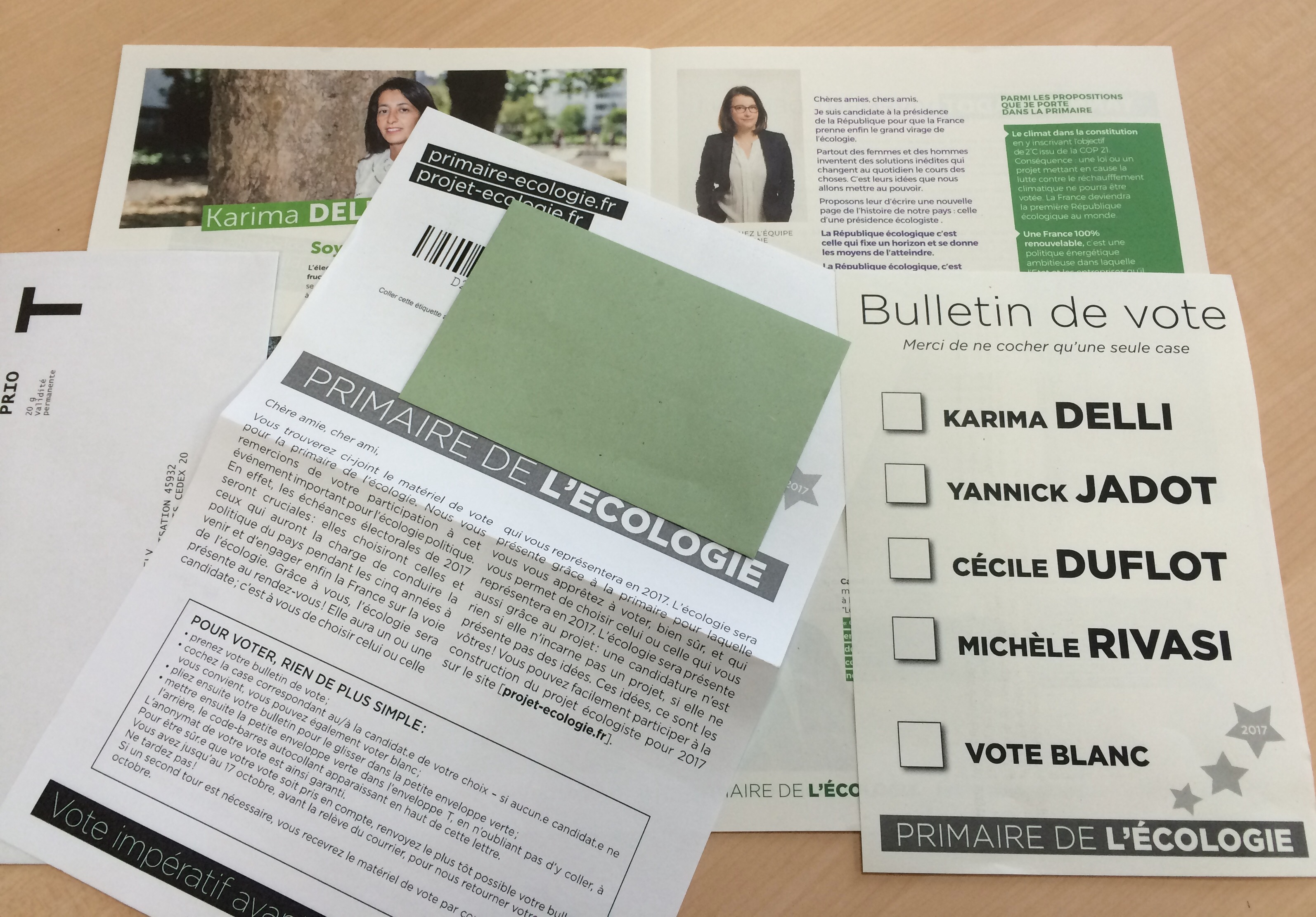 Matériel de vote pour le premier tour de la primaire présidentielle française des écologistes d'EELV en 2016.